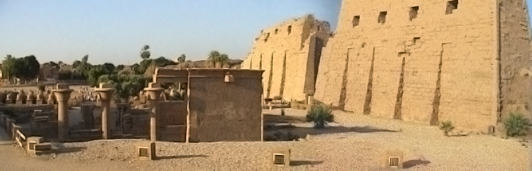 Vue sur le parvis du premier pylône du temple d'Amon-Rê de Karnak avec au premier plan la chapelle reposoir d'Achôris (XXIXe dynastie) et au second les quais et le dromos - Louxor